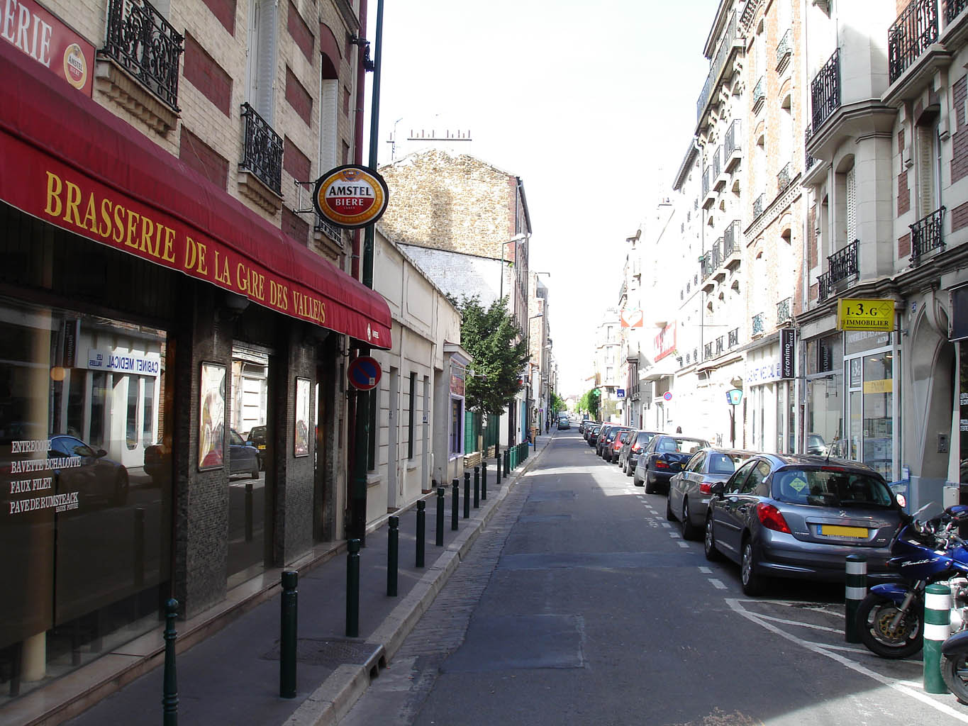 La rue des Vallées à Colombes, France.